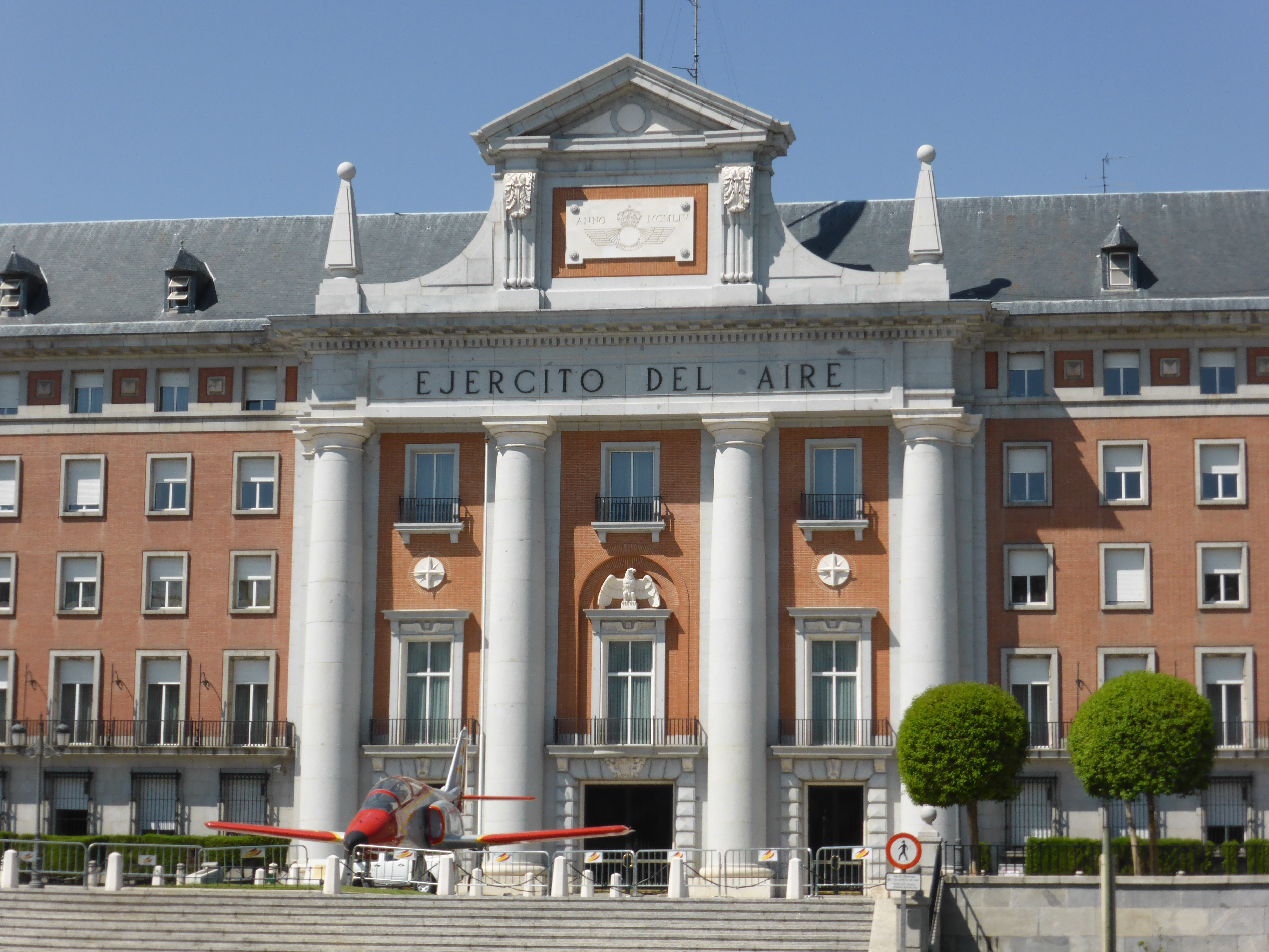 El Cuartel General del Ejército del Aire se encuentra en la zona de Moncloa, de Madrid. El "Pórtico de Honor" es la portada principal del edificio. Arriba, una lápida señala la fecha MCMLIV (1954).